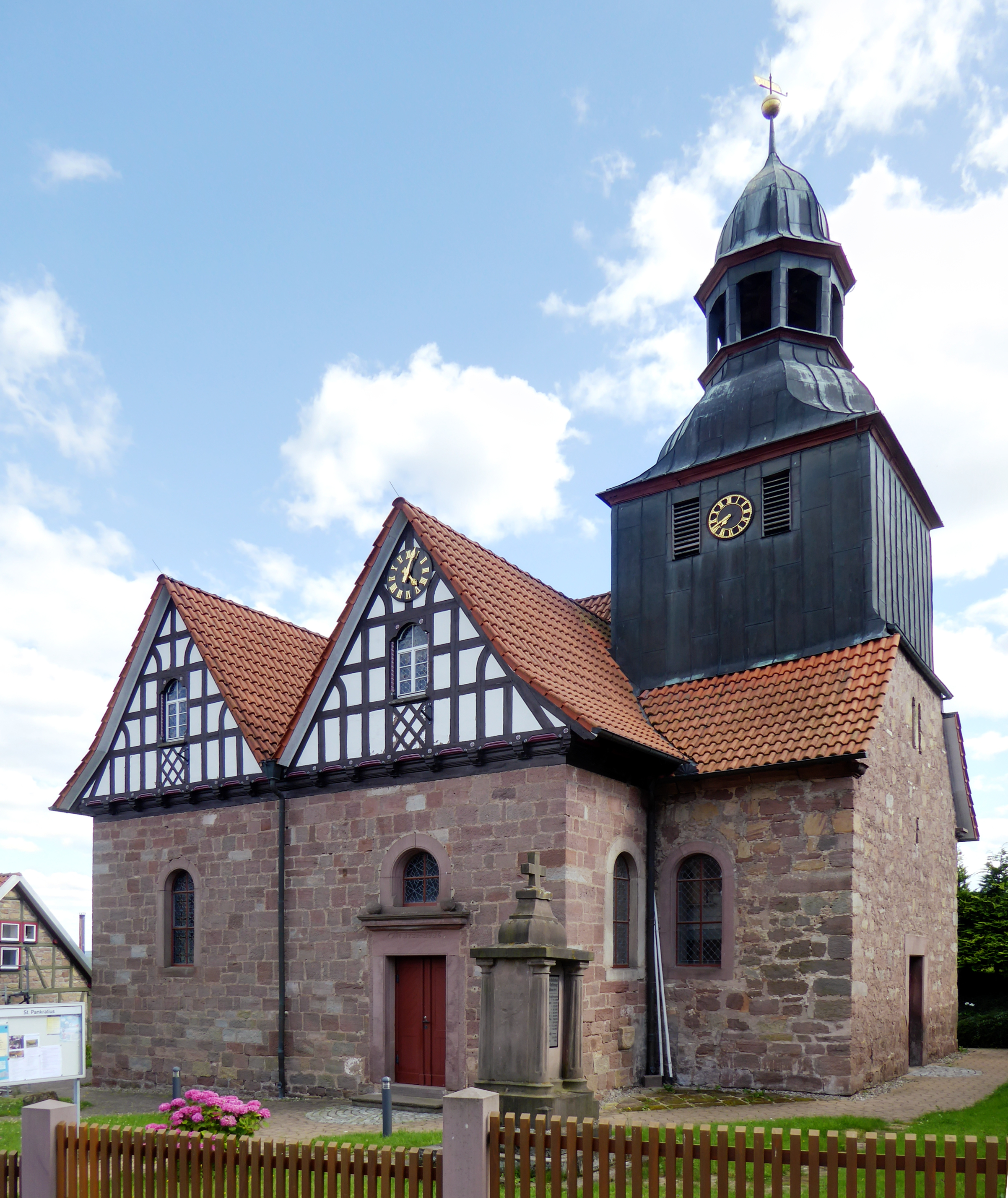 Kath. Kirche St. Pankratius in Rohrberg, Landkreis Eichsfeld, Thüringen. Erbaut 1730, Filialkirche von Arenshausen